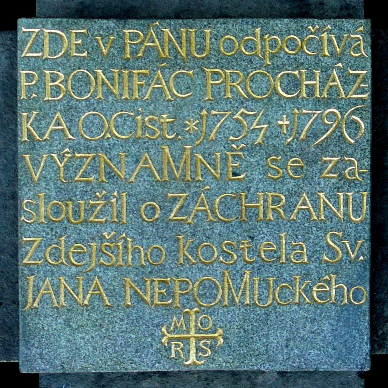 Deska na hrobě P. Bonifáce Procházky v areálu poutního kostela sv. Jana Nepomuckého na Zelené hoře ve Žďáře nad Sázavou, kterou nechal opatřit pan Zdeněk Chudárek.